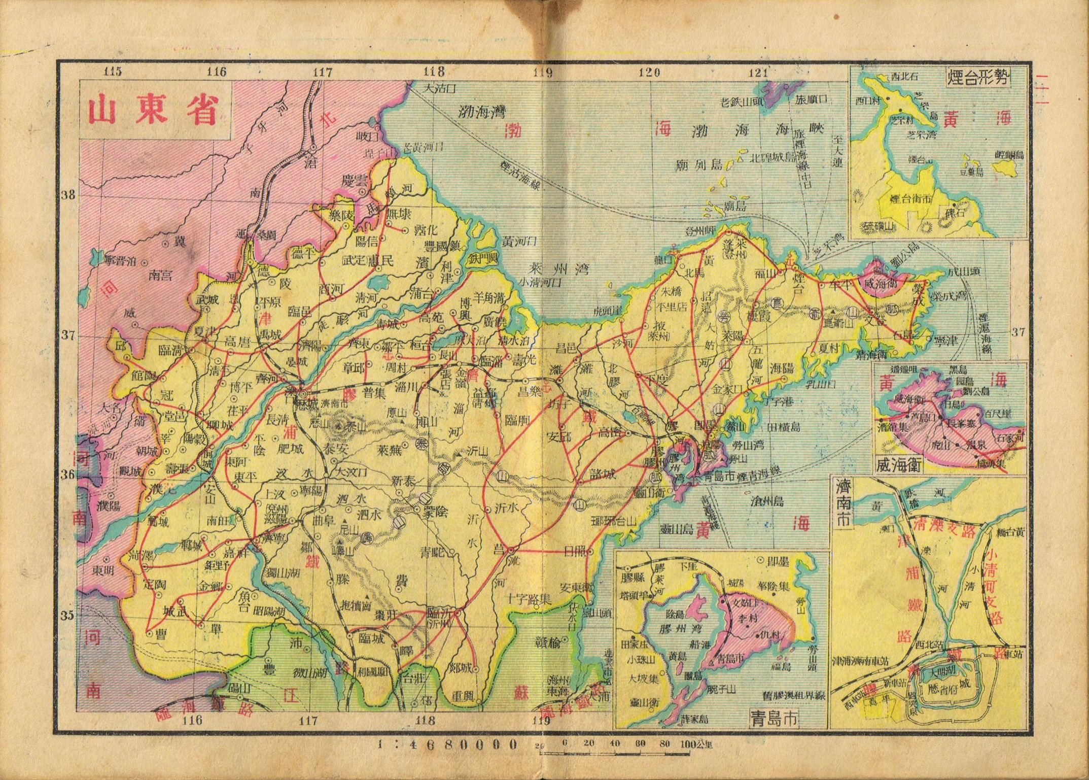 亚新地学社1936年《袖珍中华全图》山东省